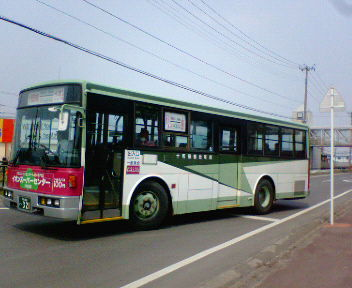 十和田観光電鉄バス イオンスーパーセンター十和田店・シャトルバス（いすゞ・キュービック：U-LV324K：富士7E架装車・元：川崎鶴見臨港バス） 十和田市駅付近にて